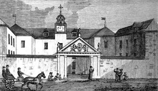 Vieux séminaire de Saint-Sulpice, 130, rue Notre-Dame Ouest, Montréal